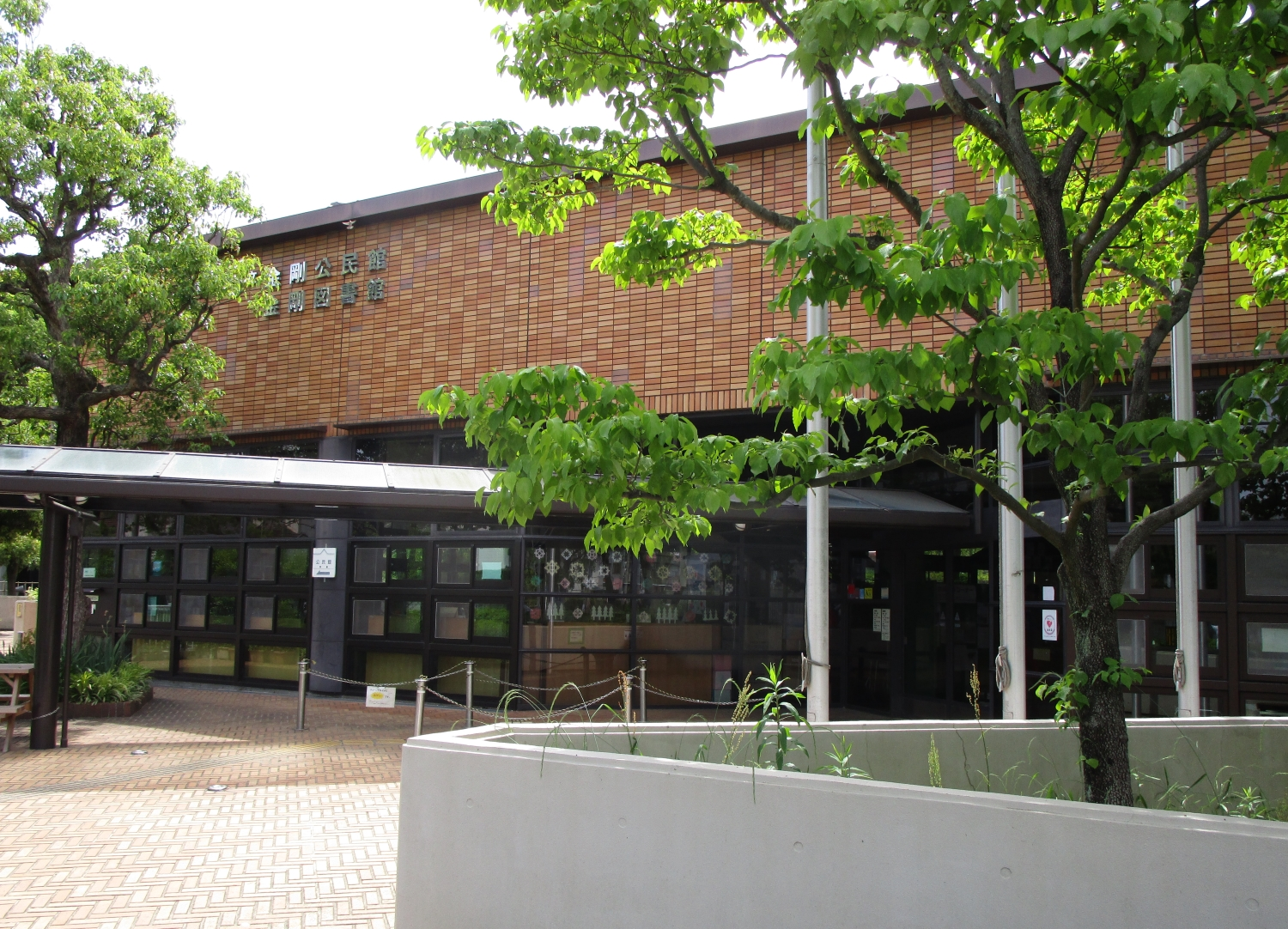 富田林市立金剛図書館